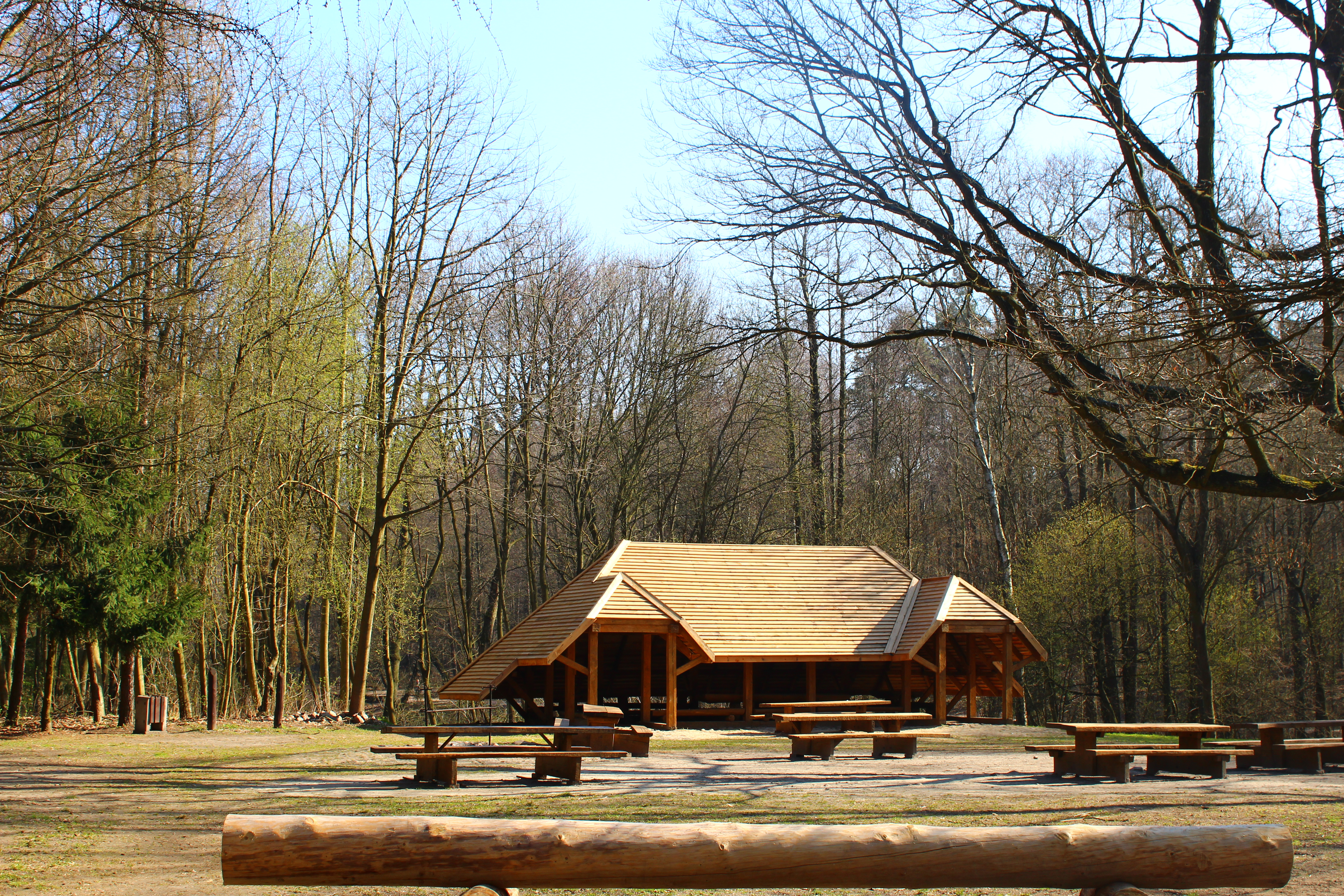 Park krajobrazowy Park Krajobrazowy Wzniesień Łódzkich.